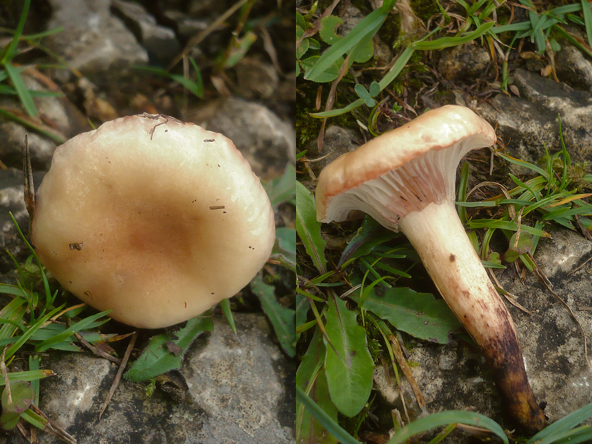 Gomphidius maculatus (Scop.) Fr. var. maculatus